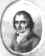 Беларуская (тарашкевіца): Францішак Карпінскі